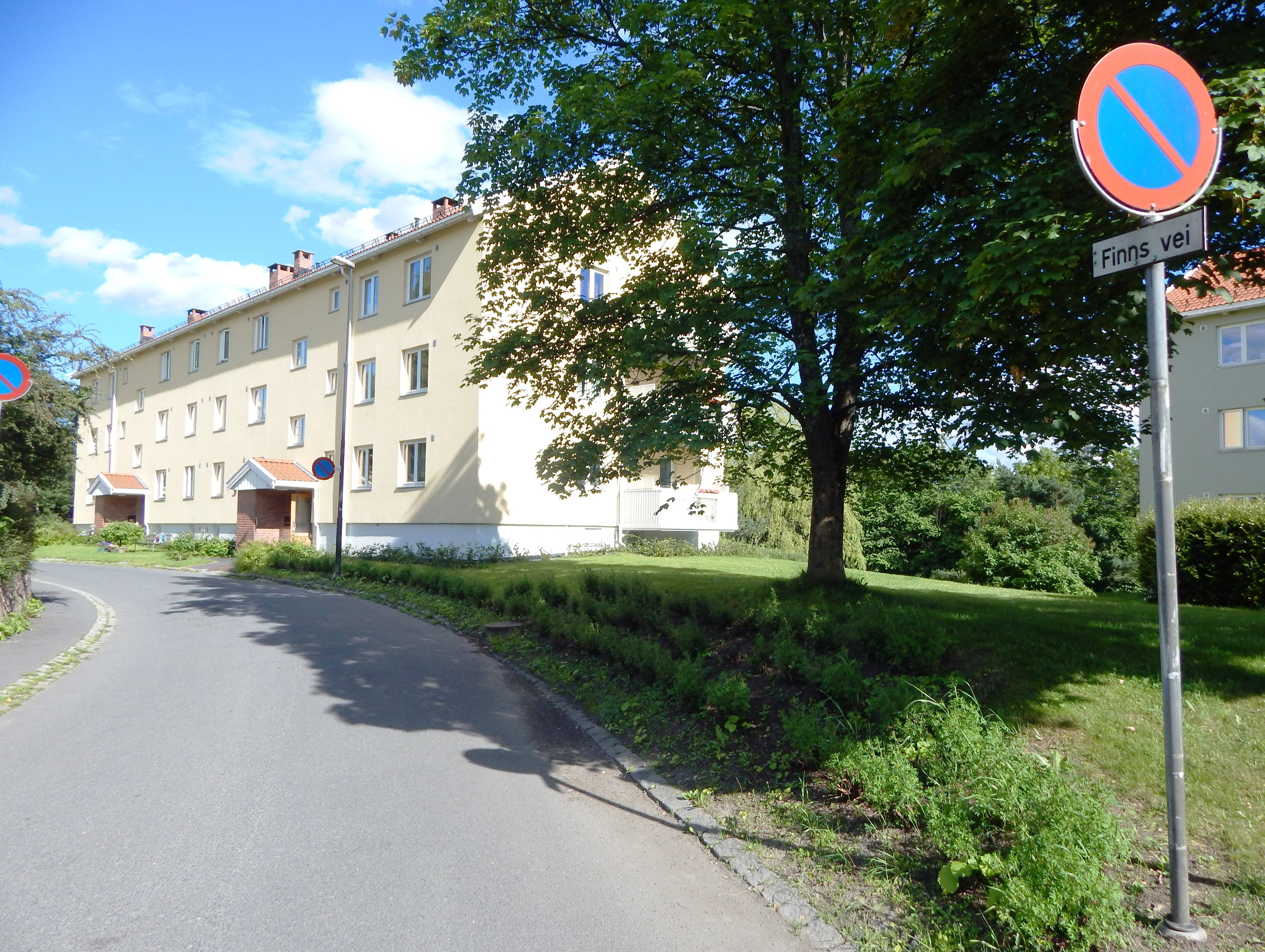 Finns vei